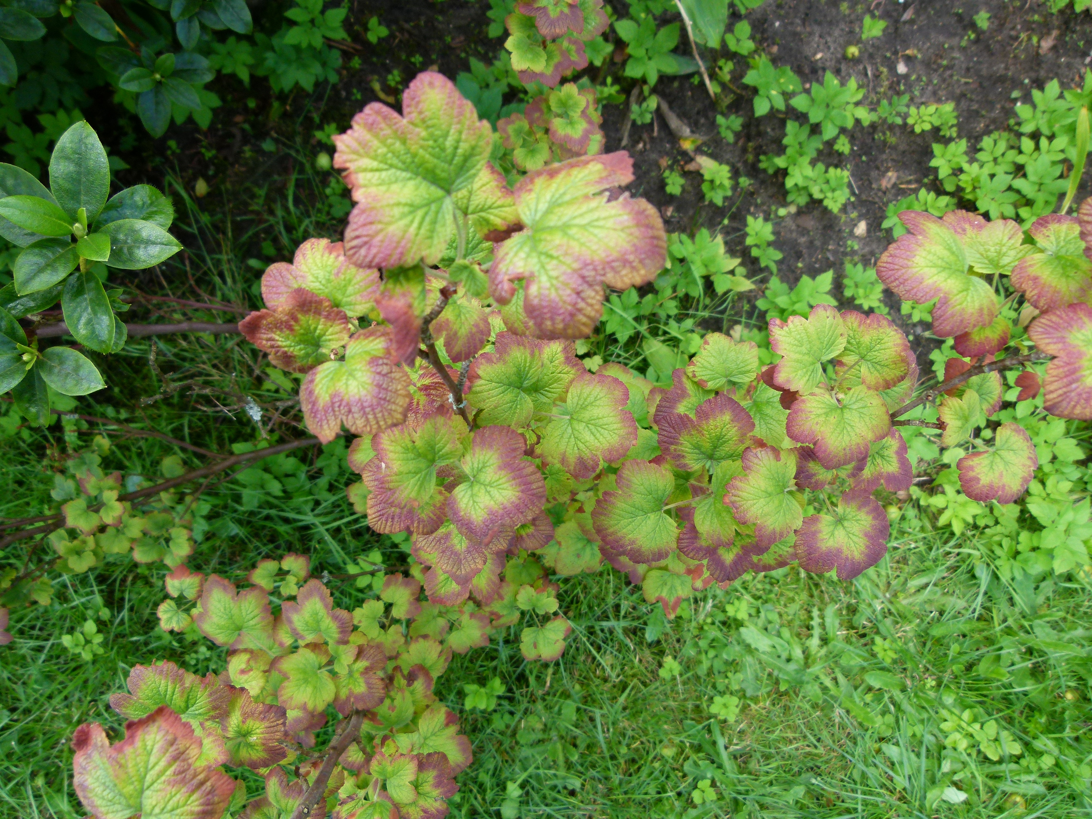 Un cassissier